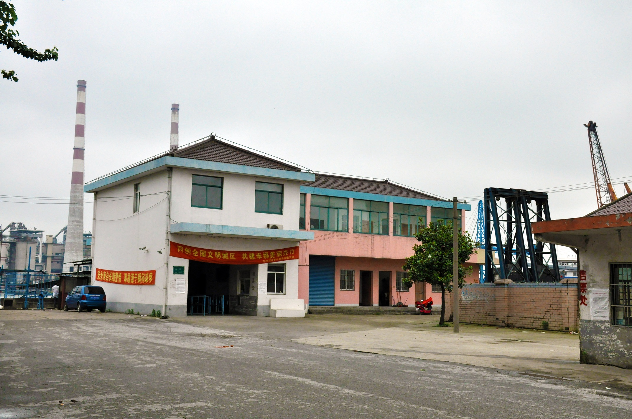 邬马渡邬桥渡口